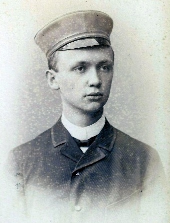 Porträtfotografie von Gustav Bansi (1879-1935)